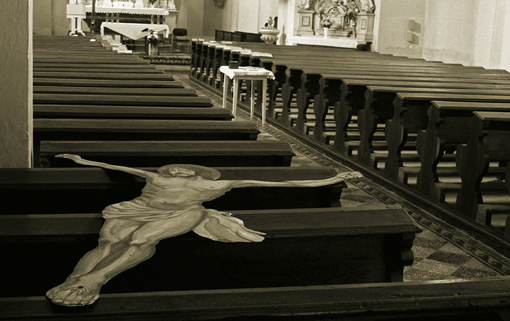 Gelatine silver print. Bromolejová fotografie.